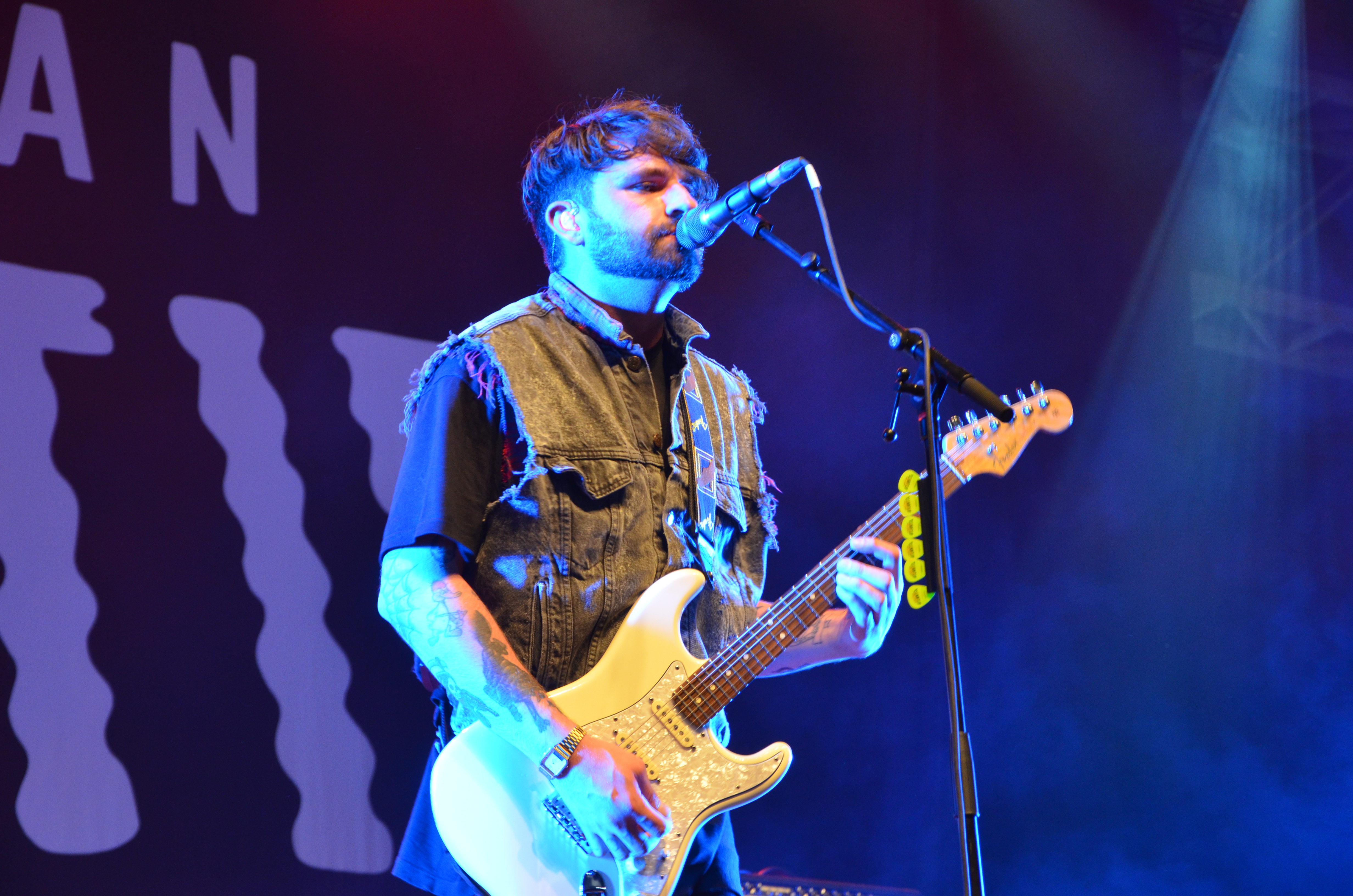 Lower Than Atlantis spielen bei Rock am Ring 2015 in Mendig.